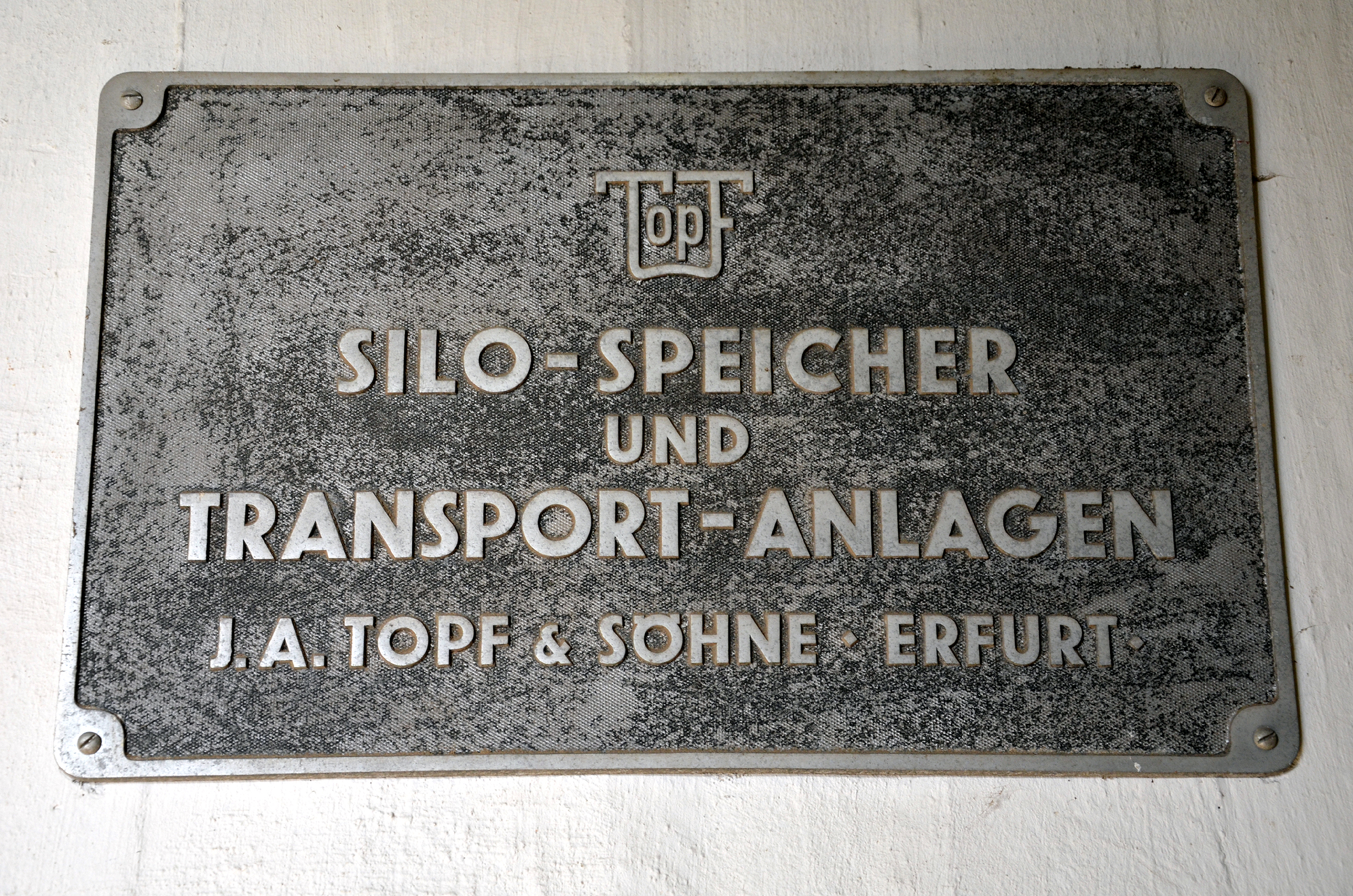 Im Hochparterre des 1942 errichteten Getreidesilos im Lindener Hafen in Hannover findet sich an der Betonwand neben dem Fahrstuhl ein großes Firmenschild, unter dem Logo die Inschrift „Silo-Speicher und Transport-Anlagen J. A. Topf & Söhne, Erfurt“ ...